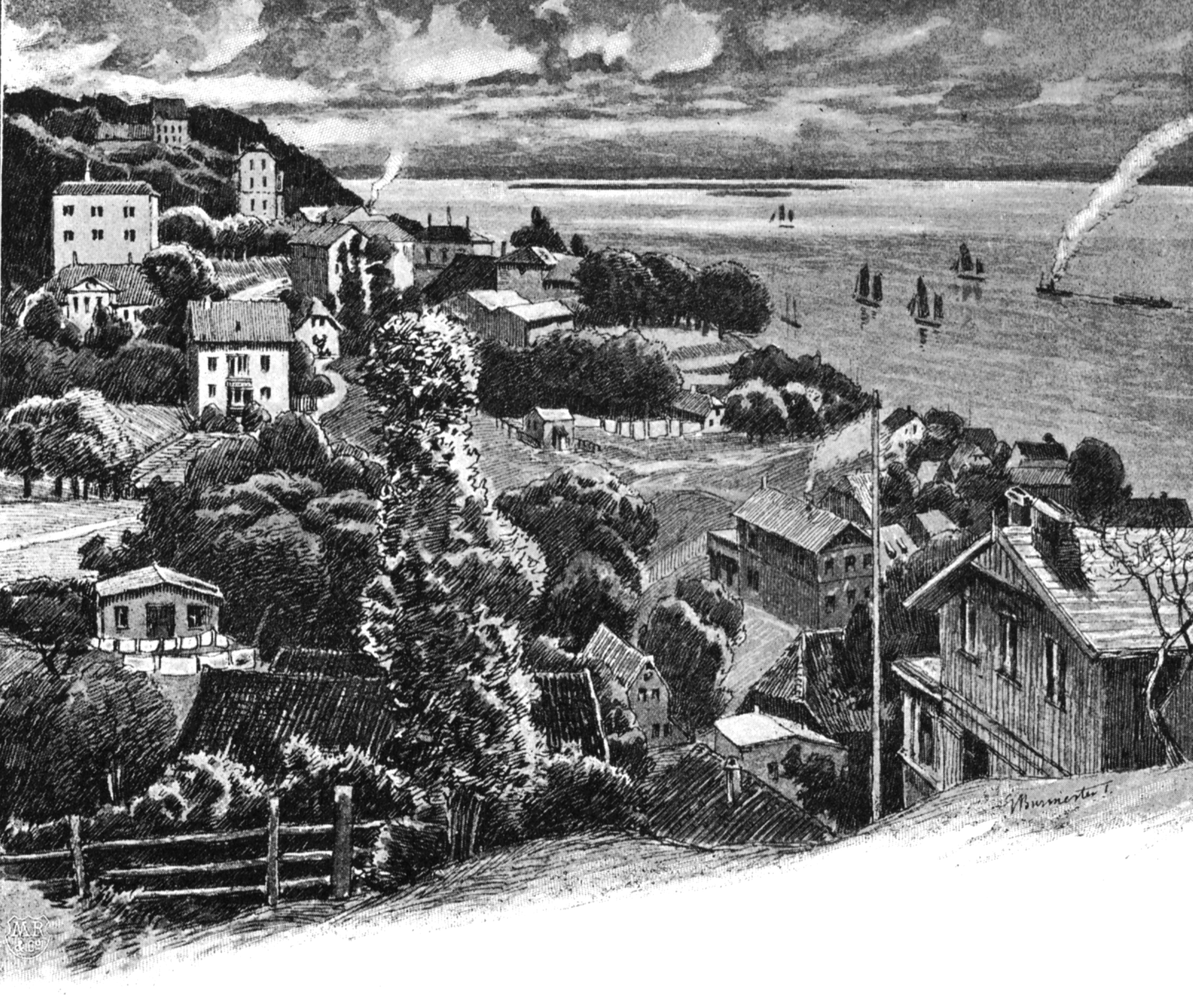 Blick vom Sülberg auf Blankenese an der Elbe, Zeichnung von Georg Burmester um 1895